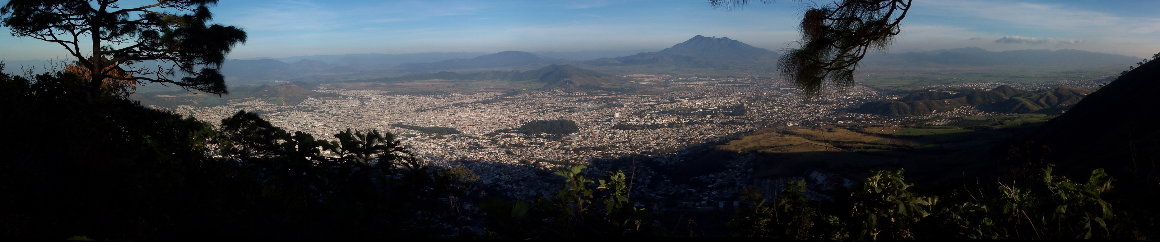 Vista panorámica de la ciudad mexicana de Tepic, en el estado de Nayarit.